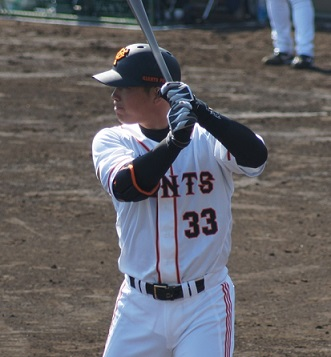 Giants_ishi33